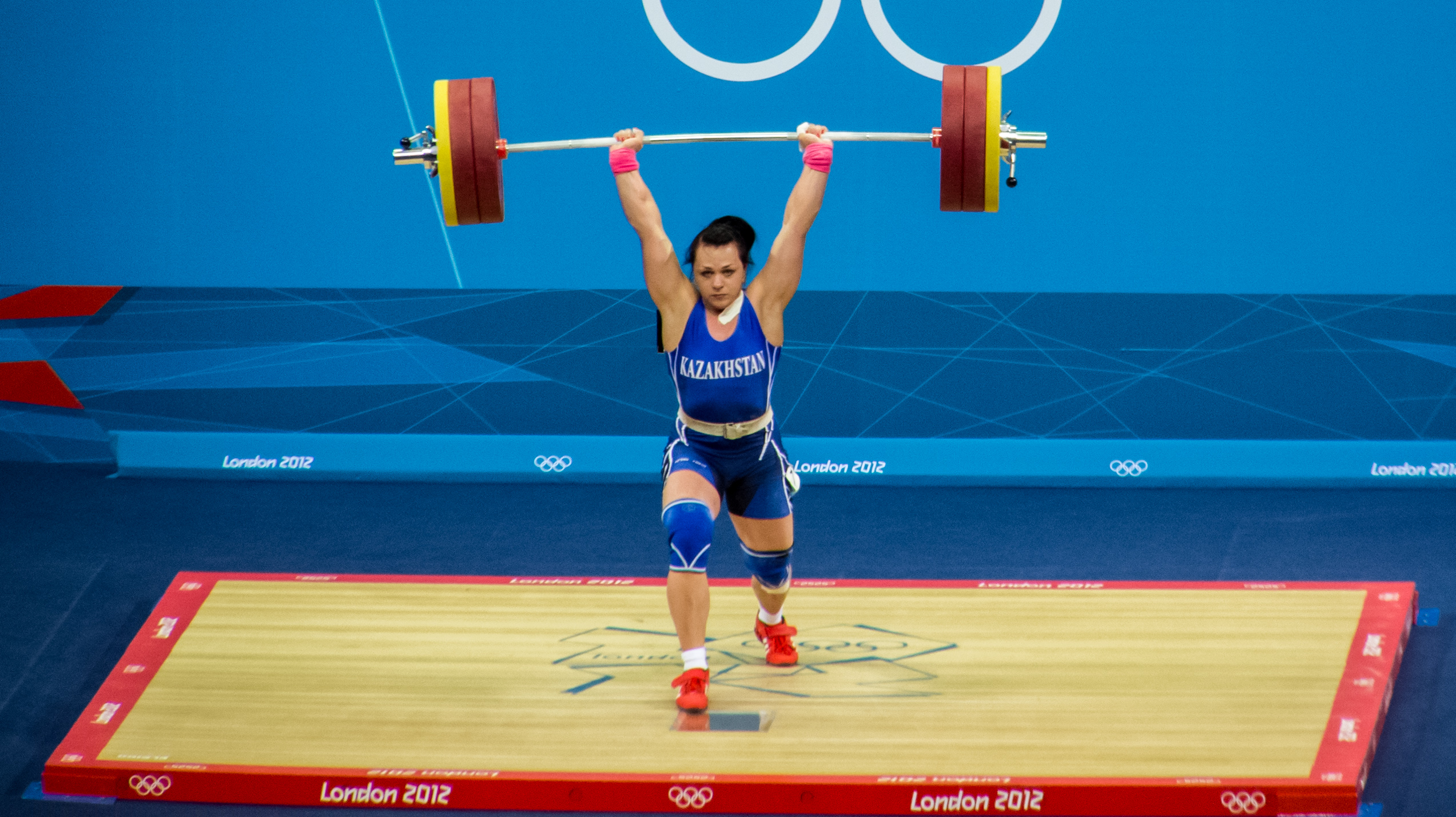 Svetlana Podobedova